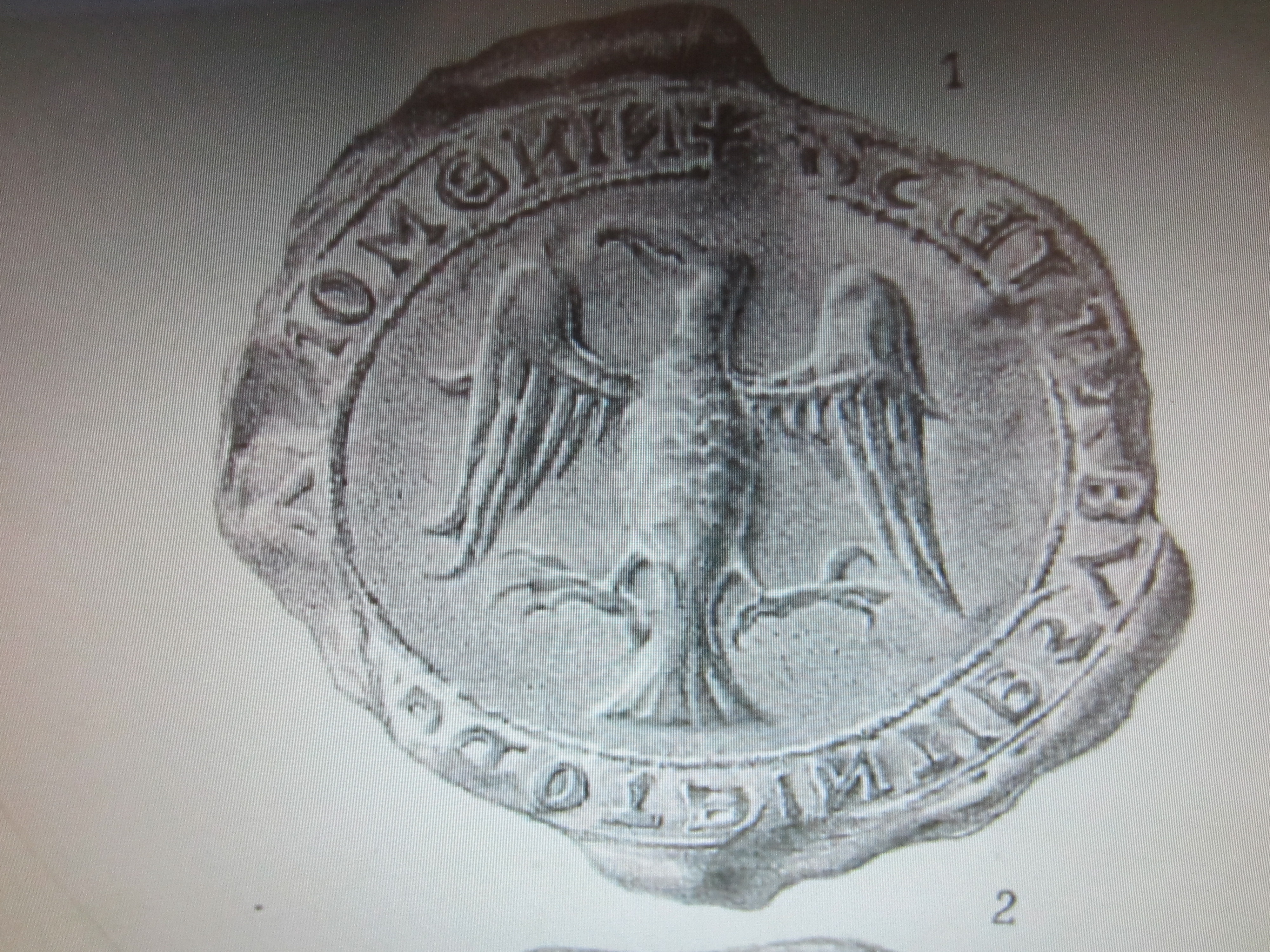 Sello y escudo del último rey almohade de Valencia Saiyid Abú Zayd